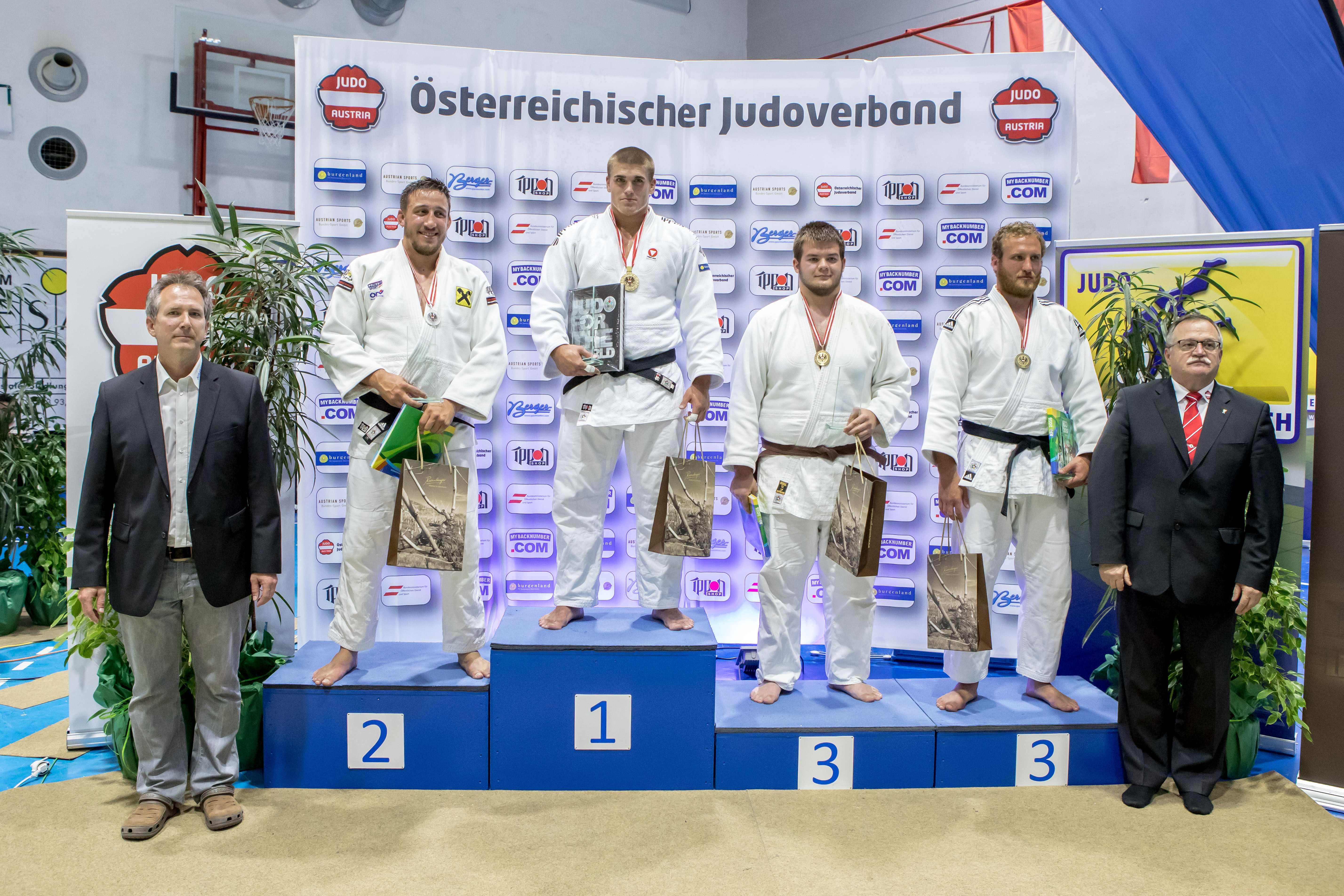 Österreichische Judo Staatsmeisterschaften in Krems